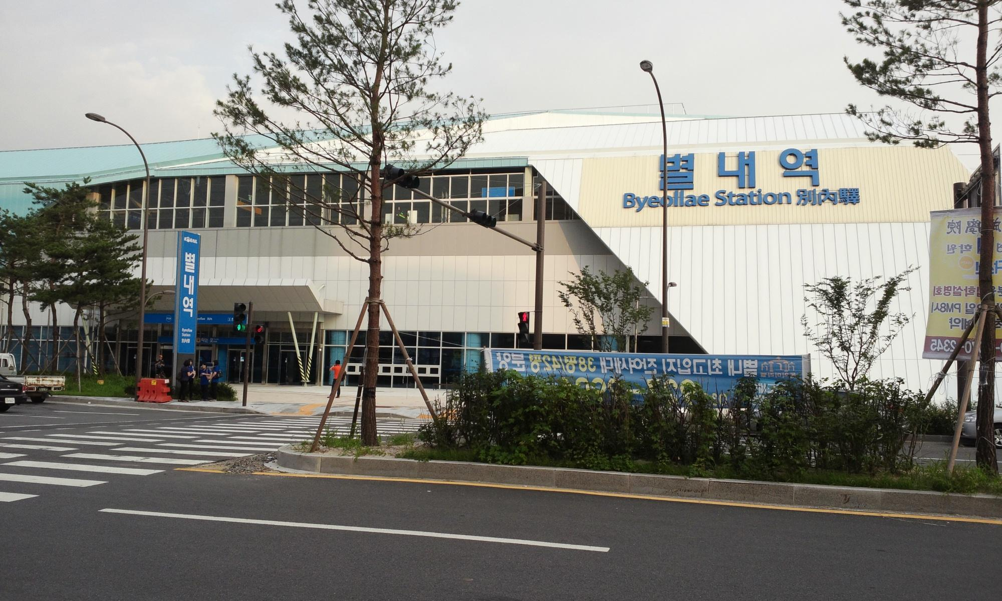 별내역 역사